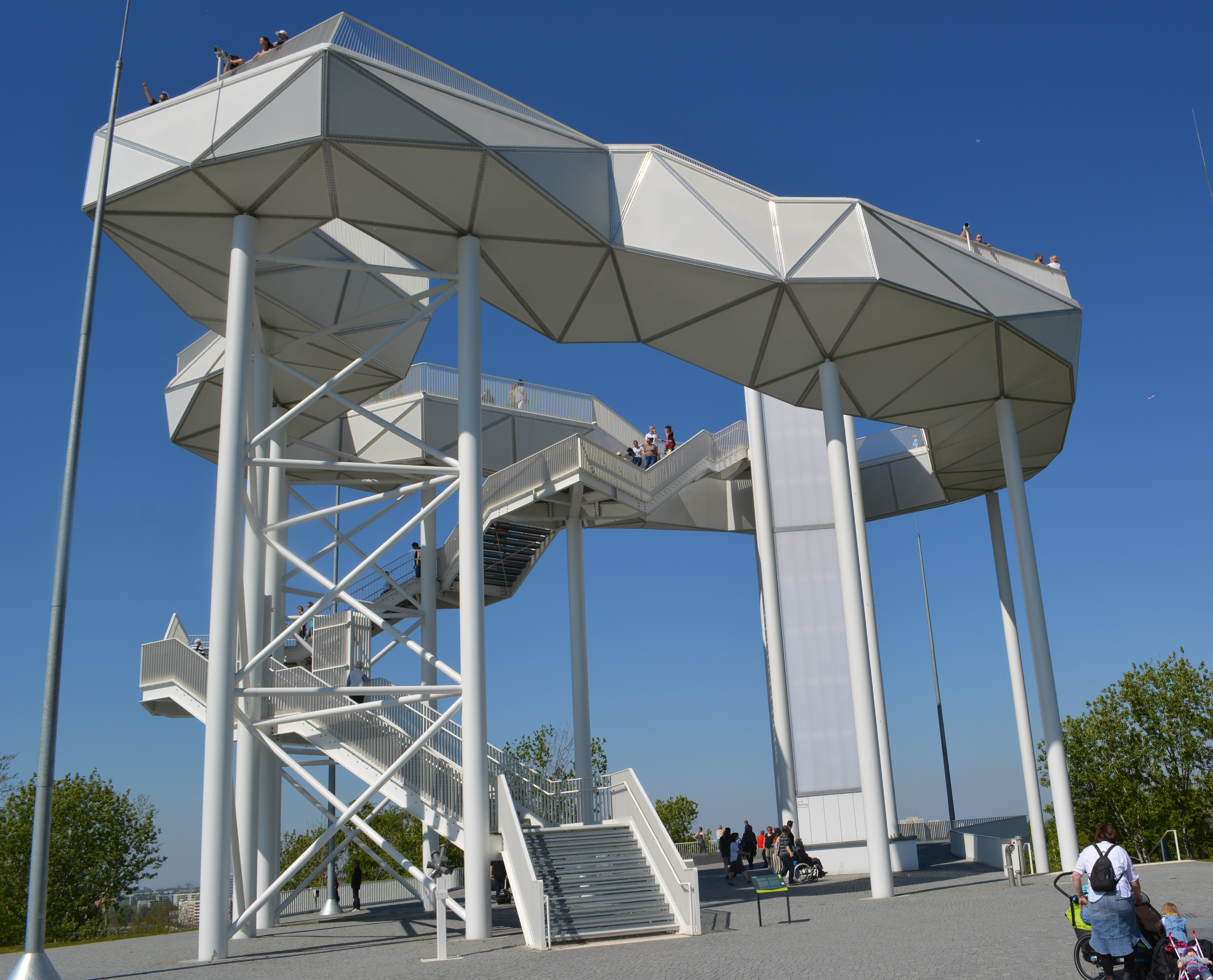 Aussichtsturm auf dem Kienberg in Berlin-Marzahn, 2017 errichtet in Verbindung mit der IGA